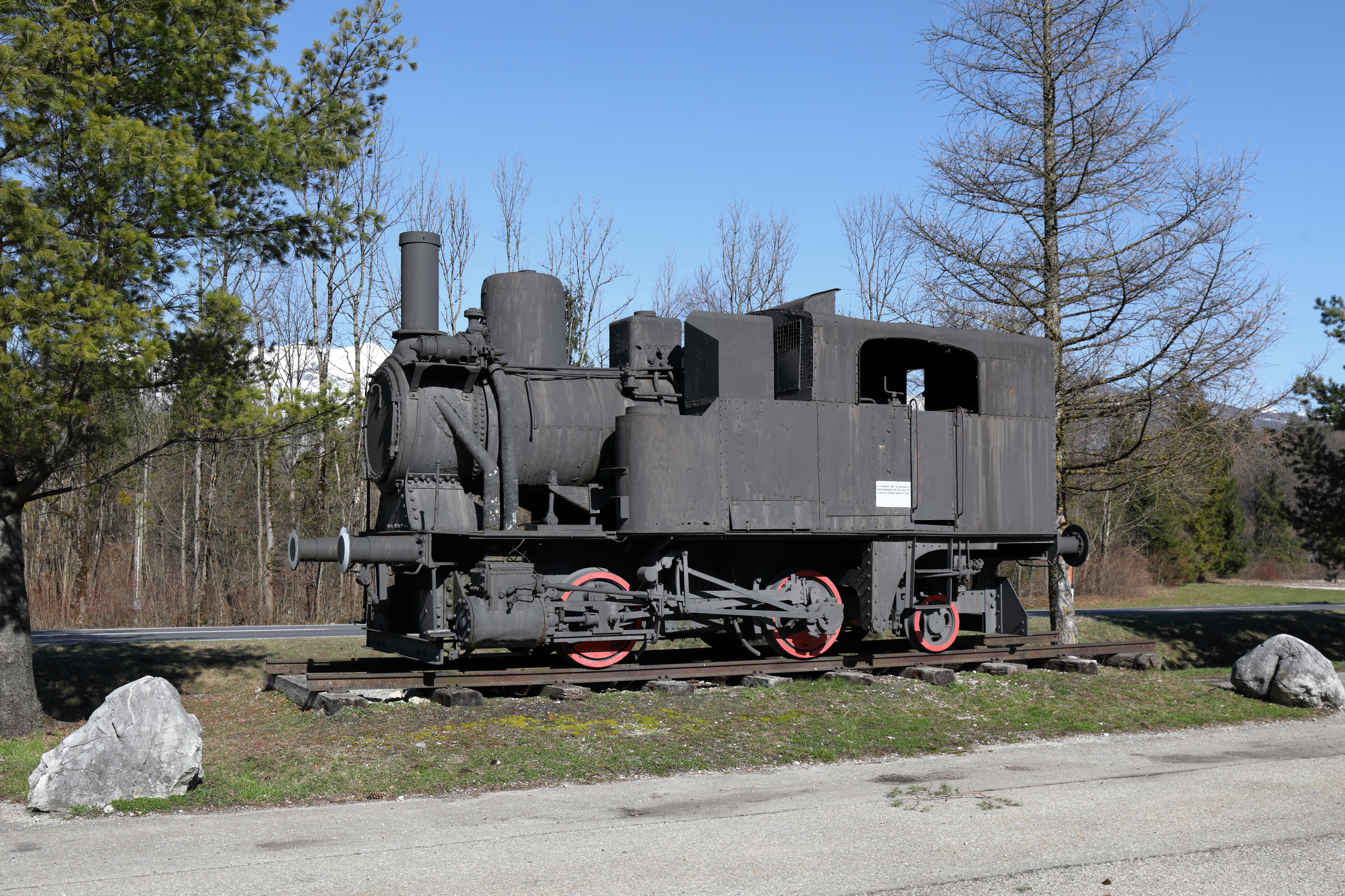 Die Denkmallokomotive StEG 3714 vor dem „Museum Fahrzeug-Technik-Luftfahrt“ an der Adresse Sulzbach 178 (unmittelbar neben der Salzkammergutstraße B 145) in Sulzbach, ein Ortsteil der oberösterreichischen Stadt Bad Ischl.Die Dampflok wurde von der Lokomotivfabrik der StEG (Staatseisenbahngesellschaft) 1910 gebaut und war bis in die 1930er Jahre als eigene Werklok im Einsatz. Nach Schließung der Lokomotivfabrik wurde sie ab 1934 als Werksbahn der Zuckerfabrik Siegendorf eingesetzt.